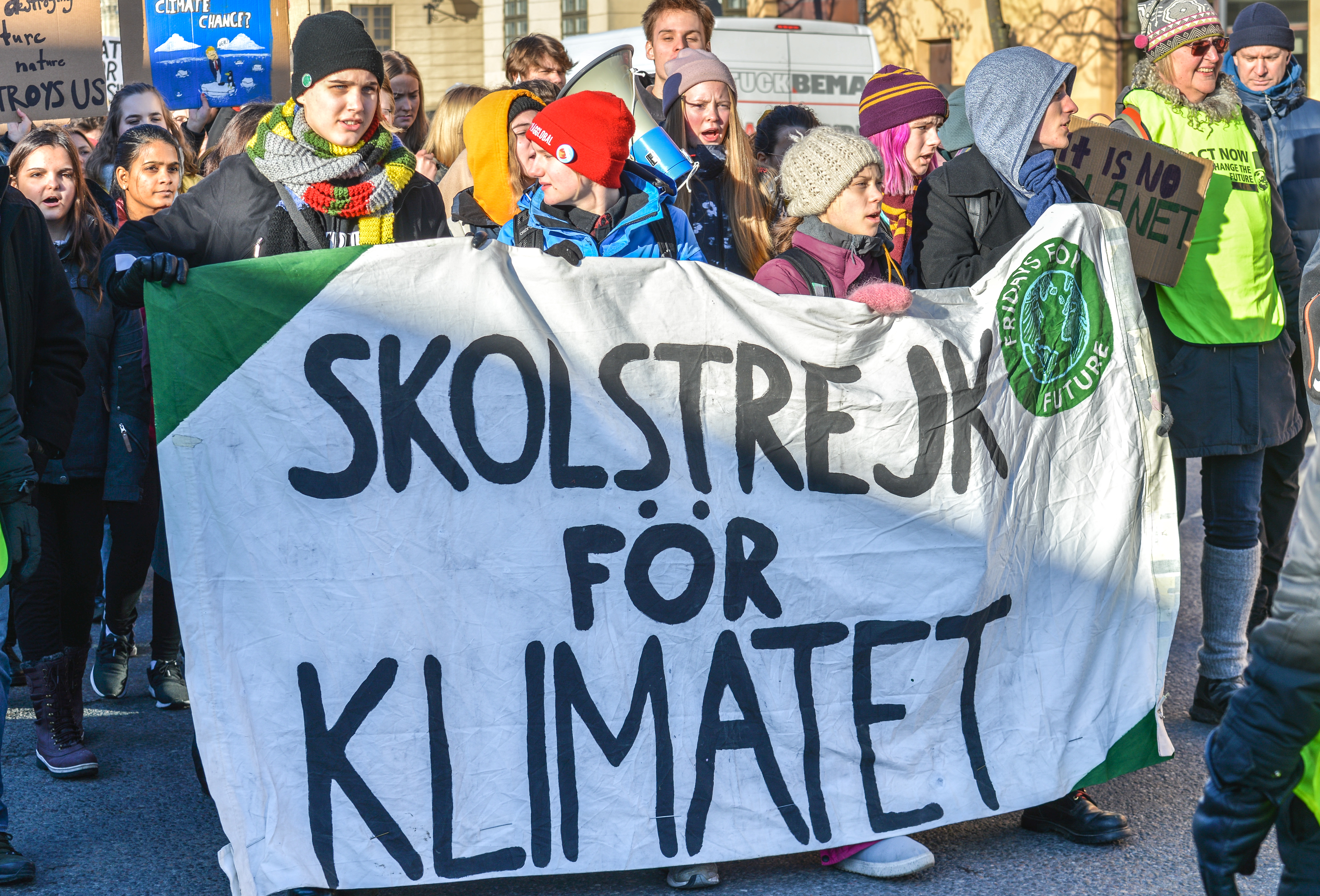 Fridays For Future tågar genom Gamla stan till Medborgarplatsen i Stockholm den 14 februari 2020.